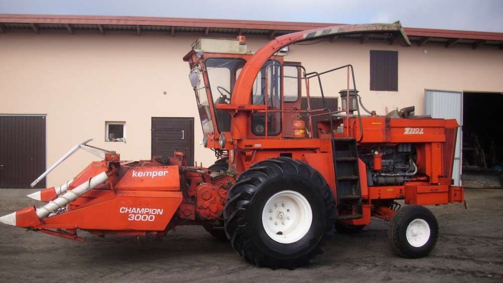 lewy bok